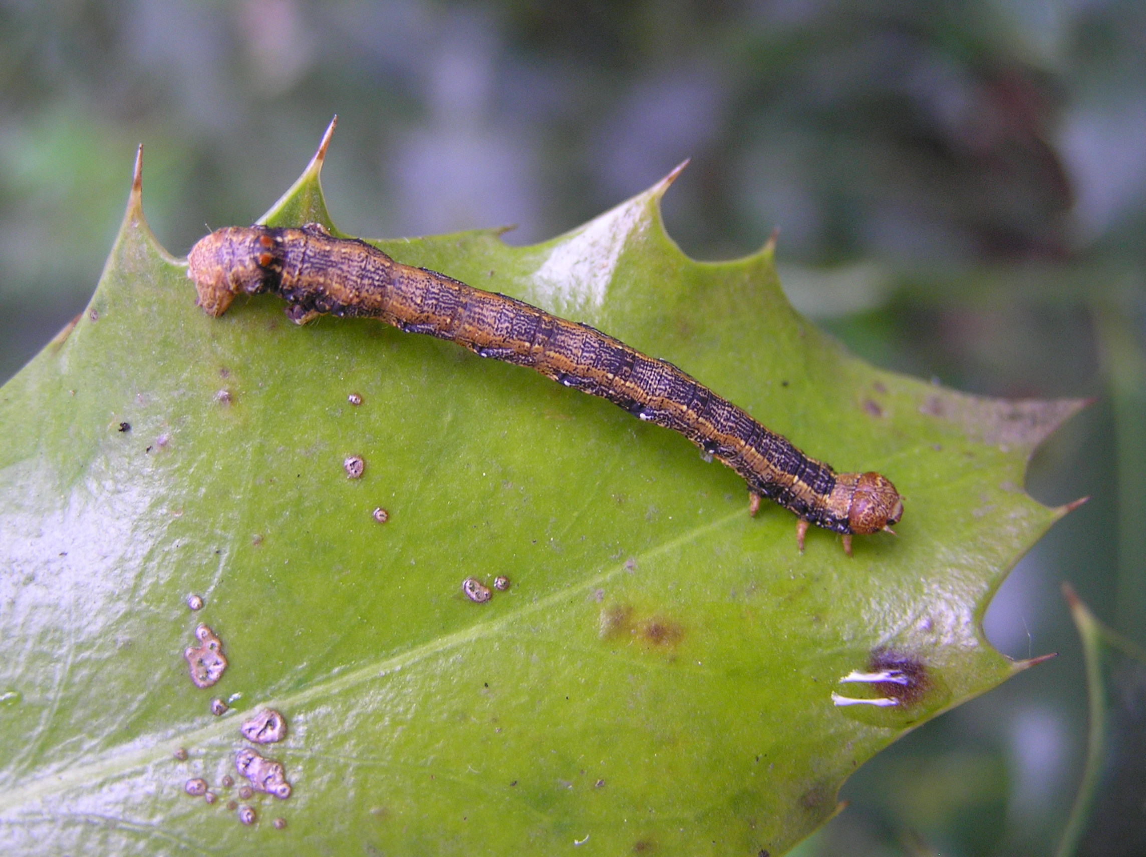 Larve Colotois pennaria